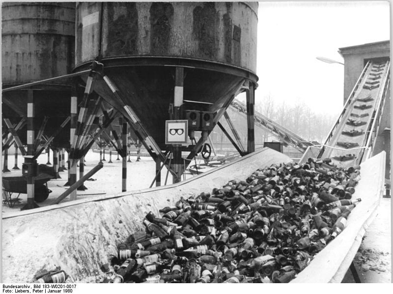 ADN-ZB-Liebers-1.2.80-Gera: Mehr als 3 300 Tonnen Altglas werden in diesem Jahr mit dieser Glasbruch-Aufbereitungsanlage in Gera-Langenberg aufbereitet und an die Glasindustrie als Sekundärrohstoff geliefert. Die Anlage, die von den Mitarbeitern des VEB Altstoffhandel Gera entwickelt und gebaut wurde, ist Teil eines entstehenden Aufbereitungszentrum für Altrohstoffe. -siehe auch W 0201-18N